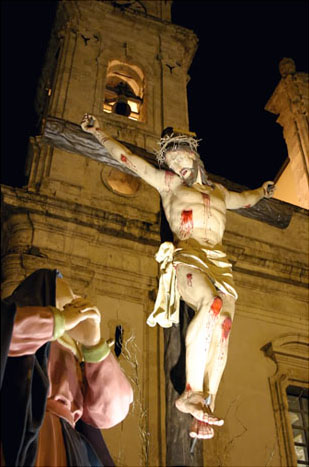 Una delle 16 Vare di Caltanissetta